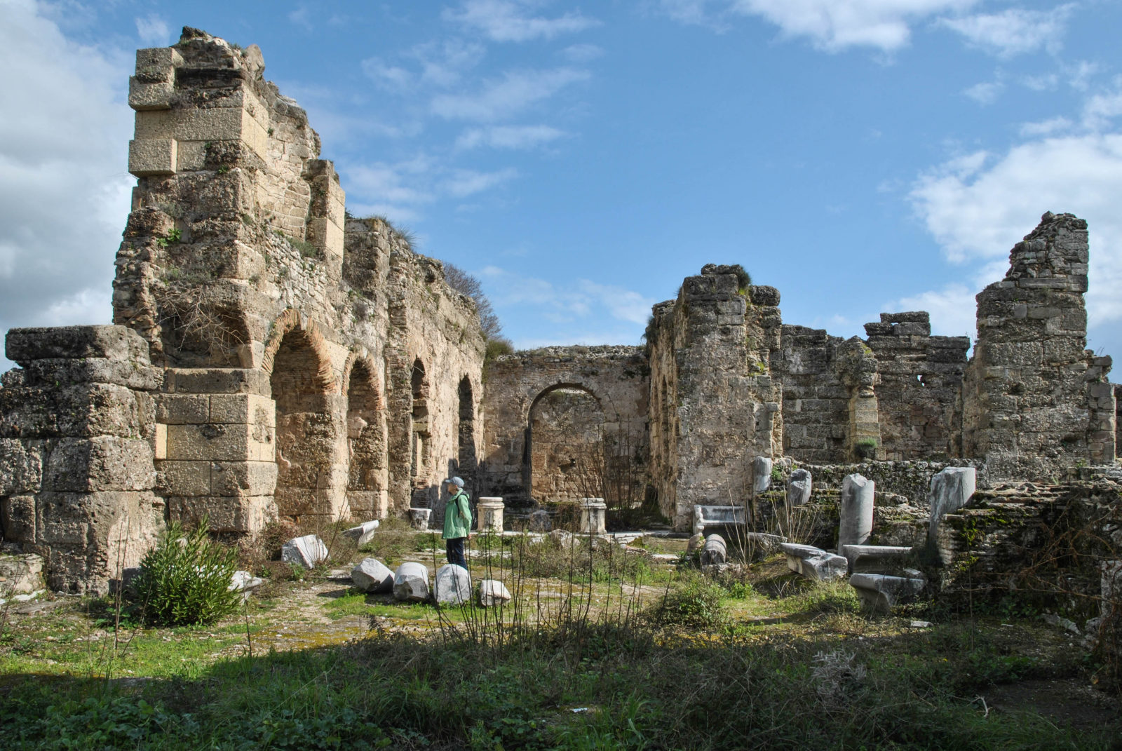 Die Mauern sind teilweise bis in Gewölbehöhe erhalten, die Marmorverkleidung der Wände ist verschwunden.